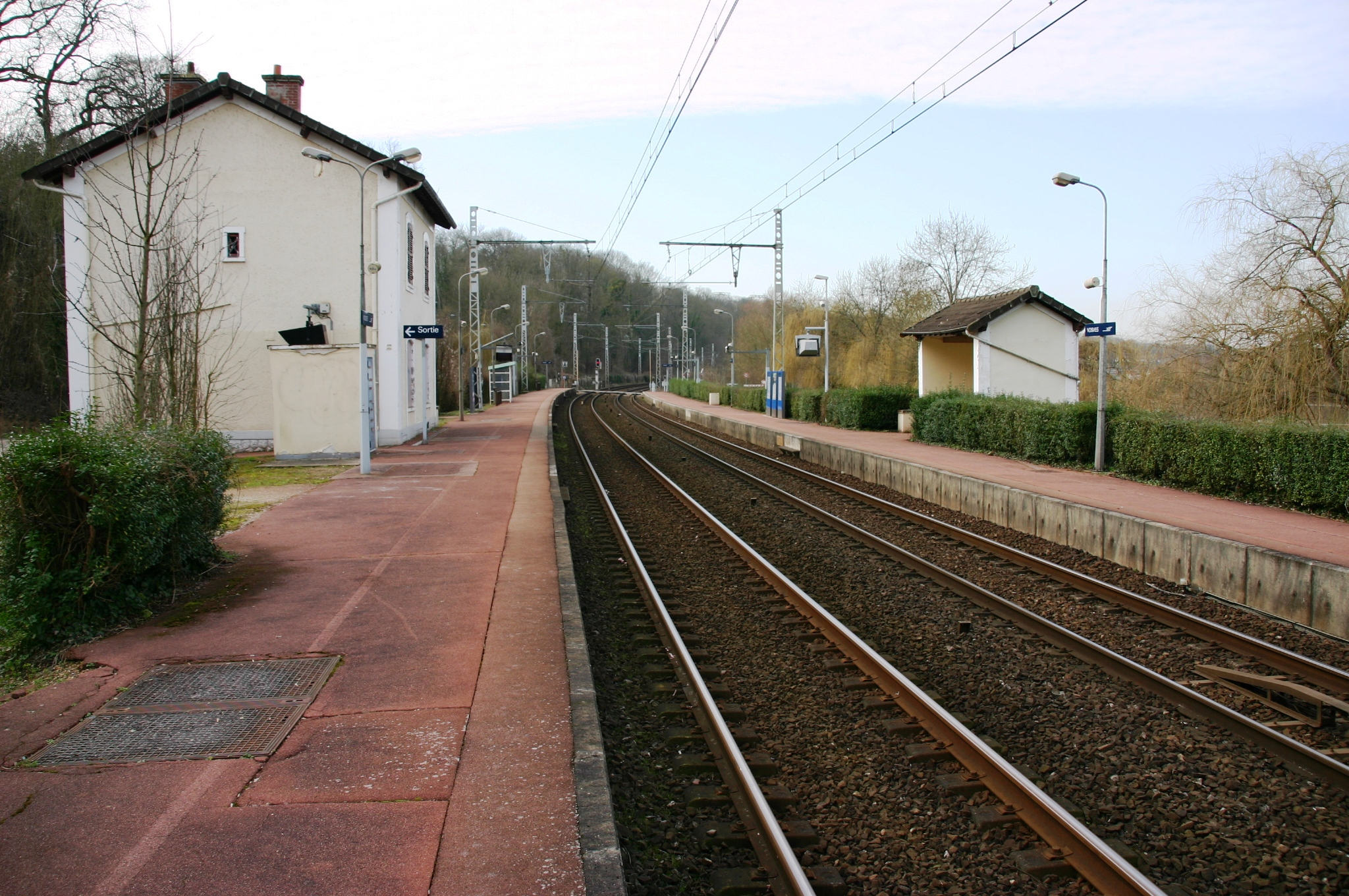 La gare de Vosves, Dammarie-lès-Lys, département de la Seine-et-Marne (France)